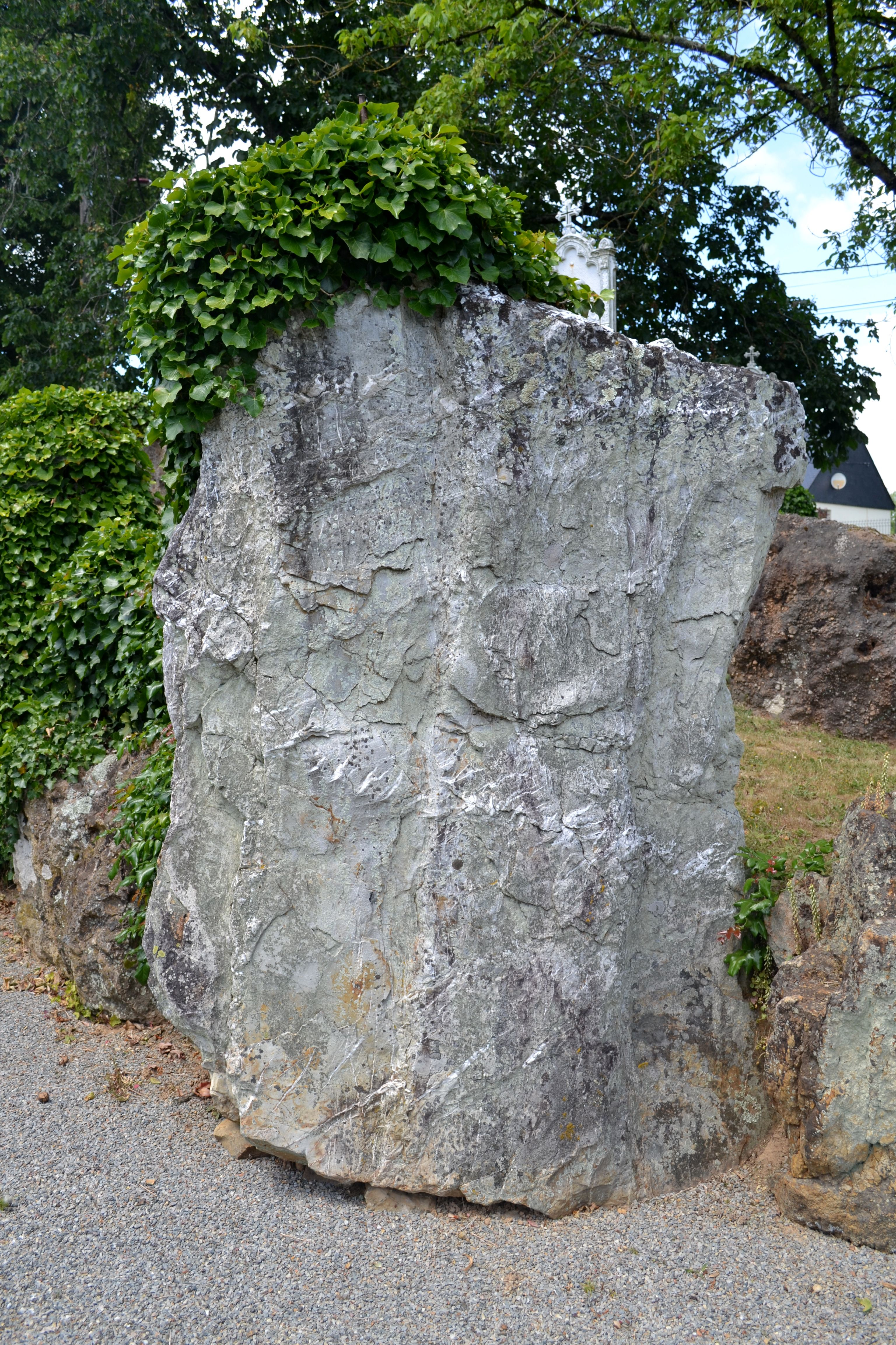 Menhir carré de Rougerand (Saint-Vincent-des-Landes) déplacé au calvaire mégalithique de Louisfert.